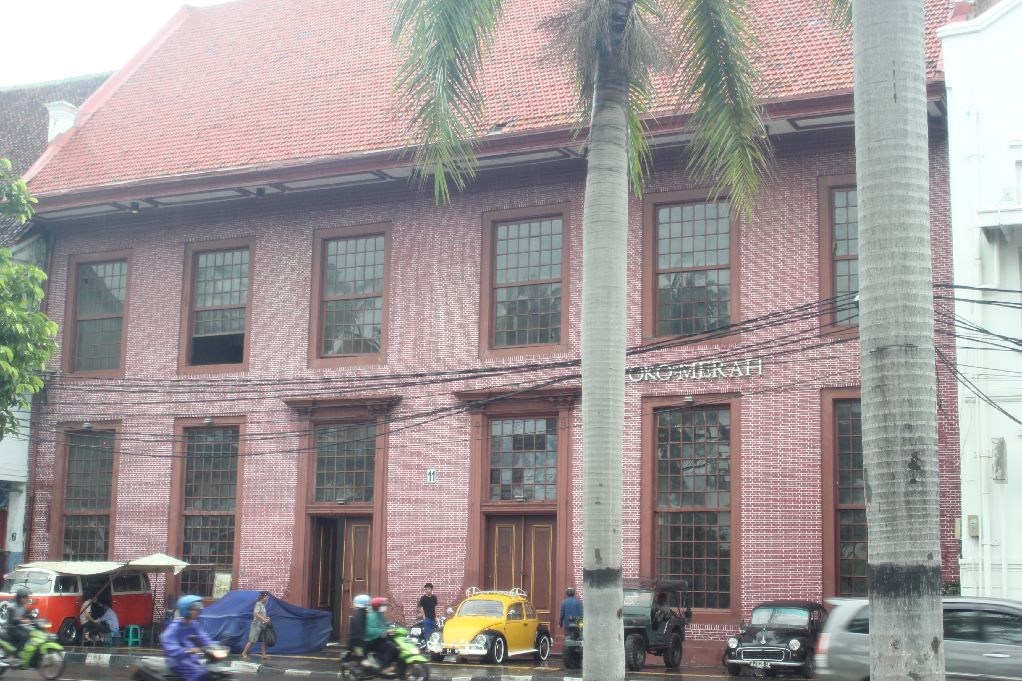 Toko Merah tahun 2015